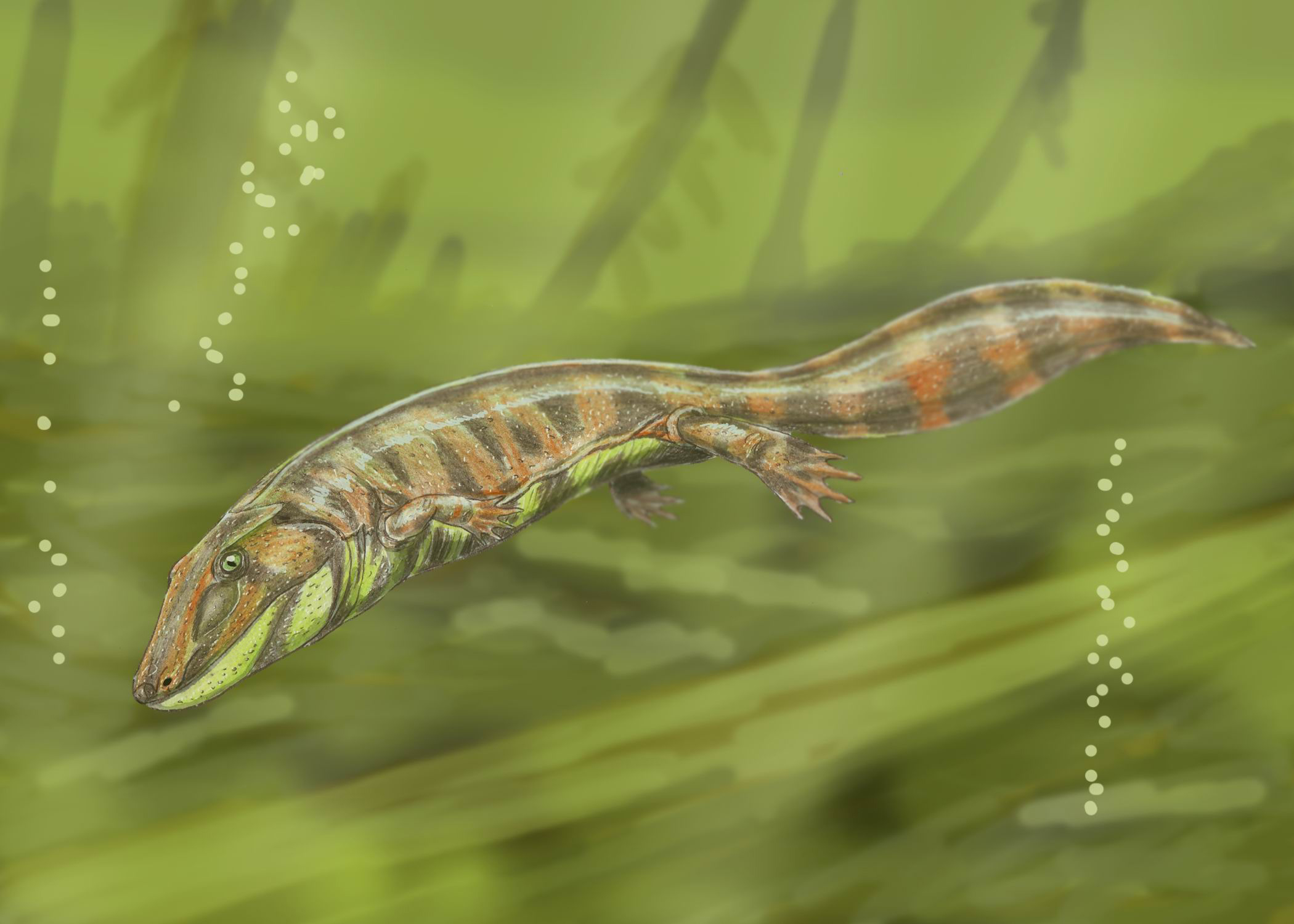 Loxomma